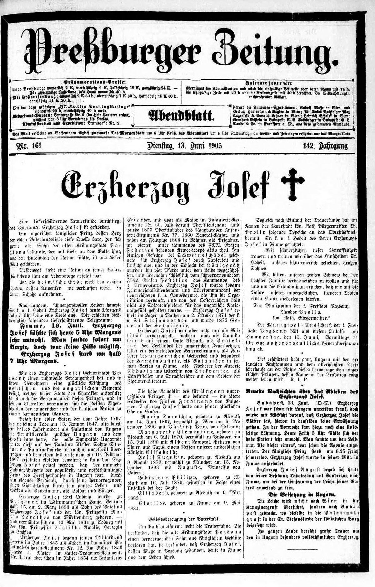 Erzherzog Josef † (* 1833, † 1905)